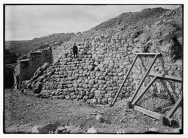 קיר התמך האלכסוני לחומת יבוס (שטח ג'י בעיר דוד) מתוך אוסף התצלומים של המושבה האמריקנית שצולם בין השנים 1898-1946 בירושלים